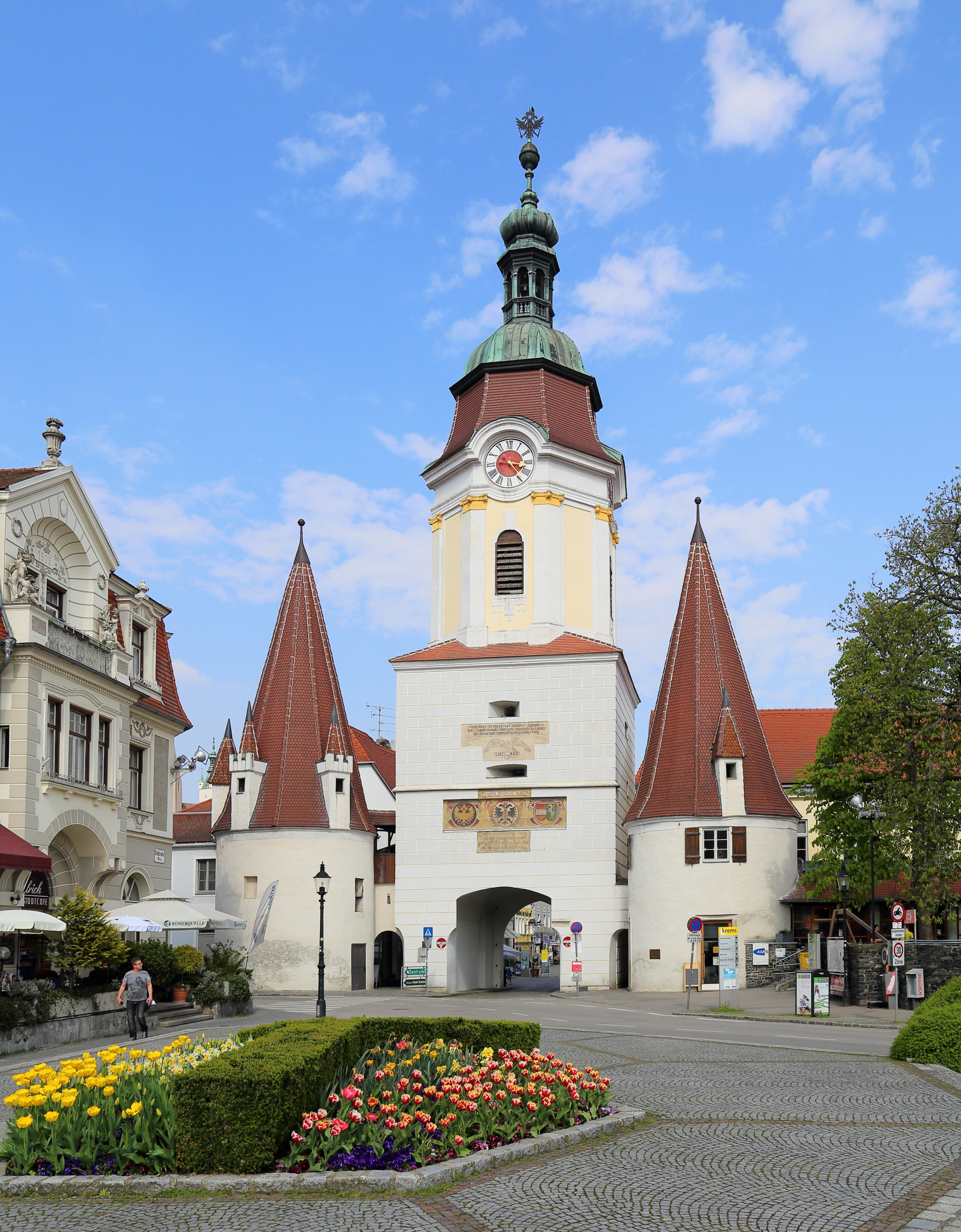 Das Steiner Tor in der niederösterreichischen Bezirkshauptstadt Krems an der Donau.Das einzige erhaltene von den ehemals 4 Stadttoren ist das Wahrzeichen der Stadt und war früher Teil der Stadtmauer, die mittlerweile abgetragen ist. Das untere Stockwerk des mächtigen Rechteckturmes sowie die flankierenden Trabantentürme stammen aus dem Ende des 15. Jahrhunderts. Der barocke Turmaufbau erfolgte in der Regierungszeit Maria Theresias (um 1750).